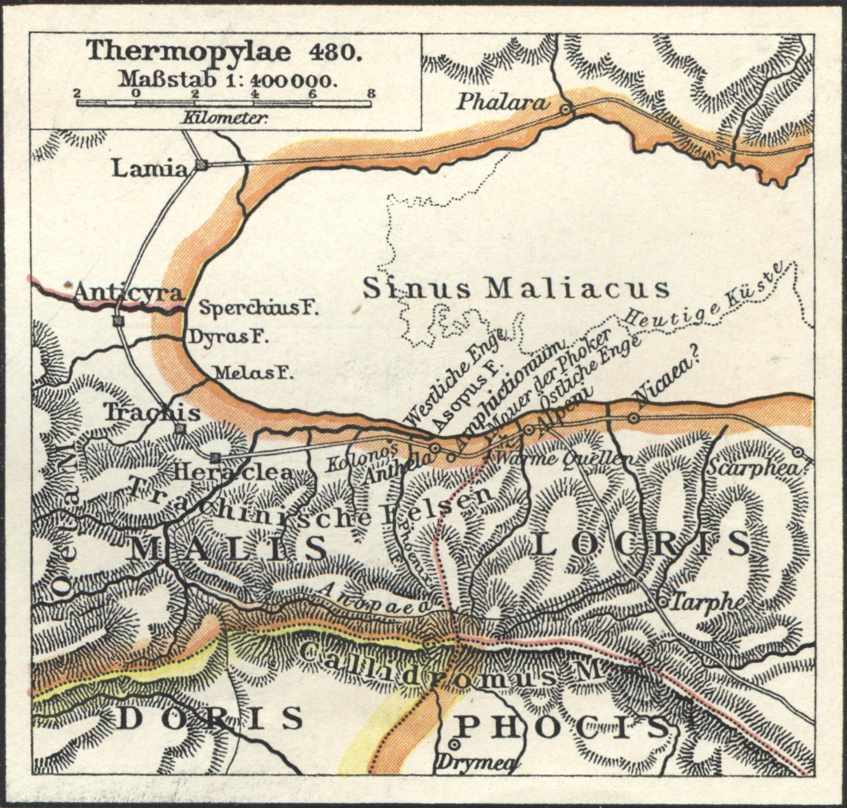 Karte der Thermopylen um 480 v. Chr.